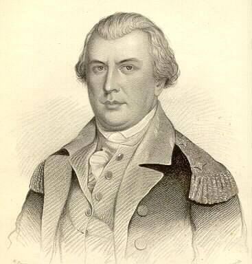 nicolas arredondo virrey de la plata